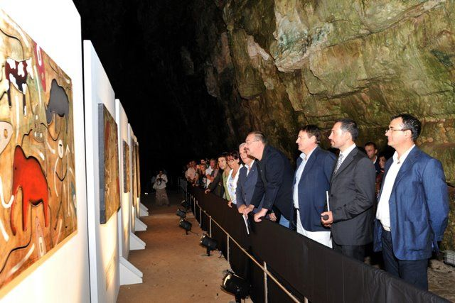 Foto scattata il giorno dell'inaugurazione della mostra di Andrea Benetti, allestita per circa un mese all'interno delle grotte di Castellana (BA)